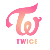 TWICE LOGO